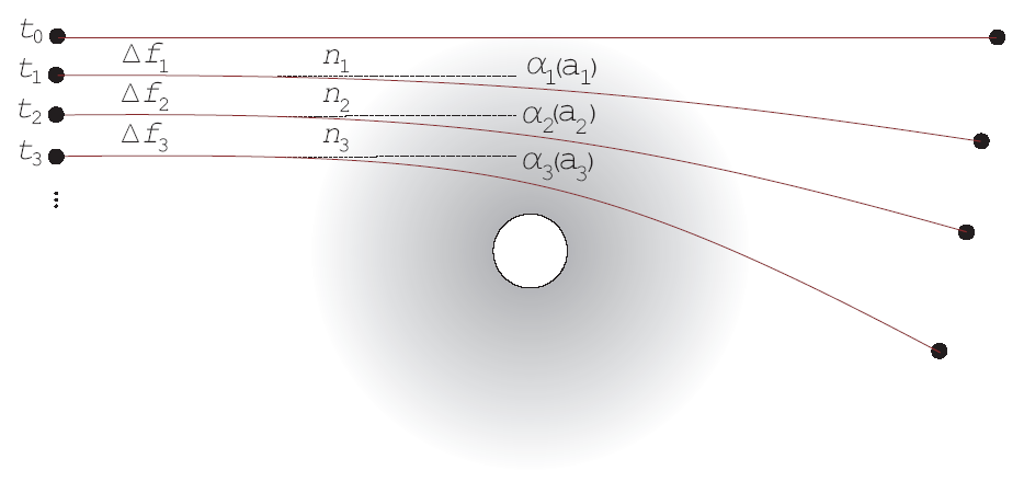 Zur Abeltransformation